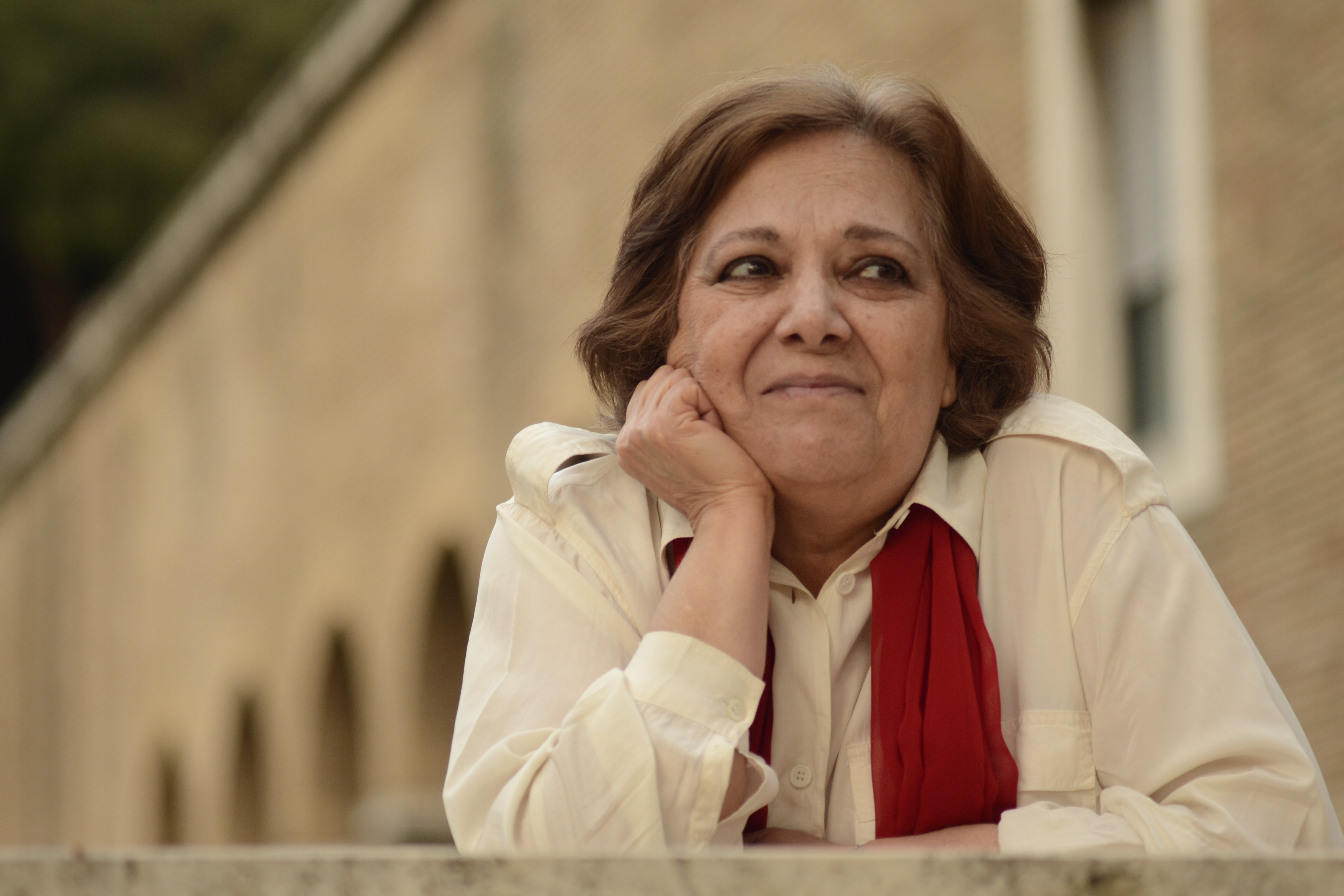 Tra le foto più recenti dell'attrice